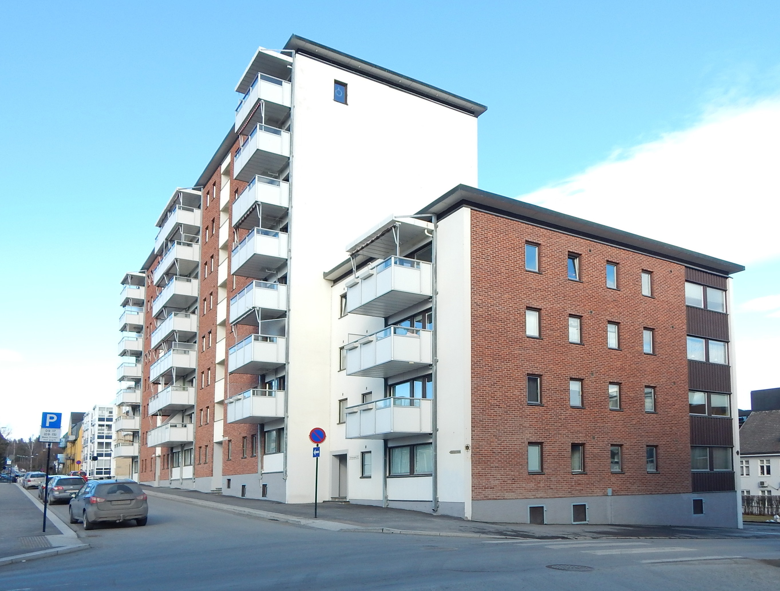 Storhamargata 23, langs Heidmanns gate ved Vestre torg